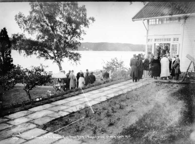 St. Hans Skjærløkka ved Bundefjorden